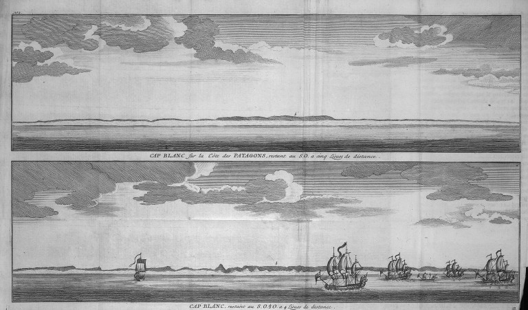 [Illustrations de Voyage autour du monde] Auteur : George Anson Éditeur : Henri-Albert Gosse et Compagnie (Genève) 1750